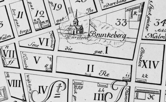 Brunkeberg med kvarteren Trållhättan (II), St Päder (V), Åskeslaget (I) och Tornwiggen (VI). Norr är till höger.